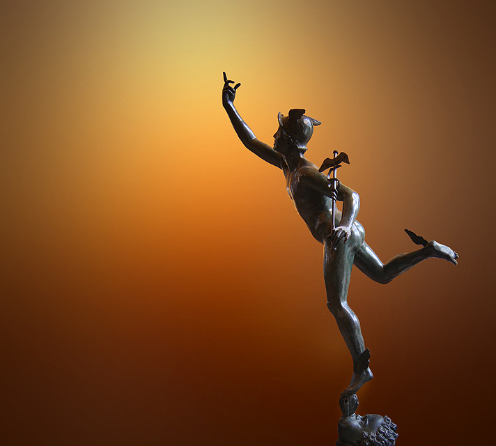 Mercúrio voando